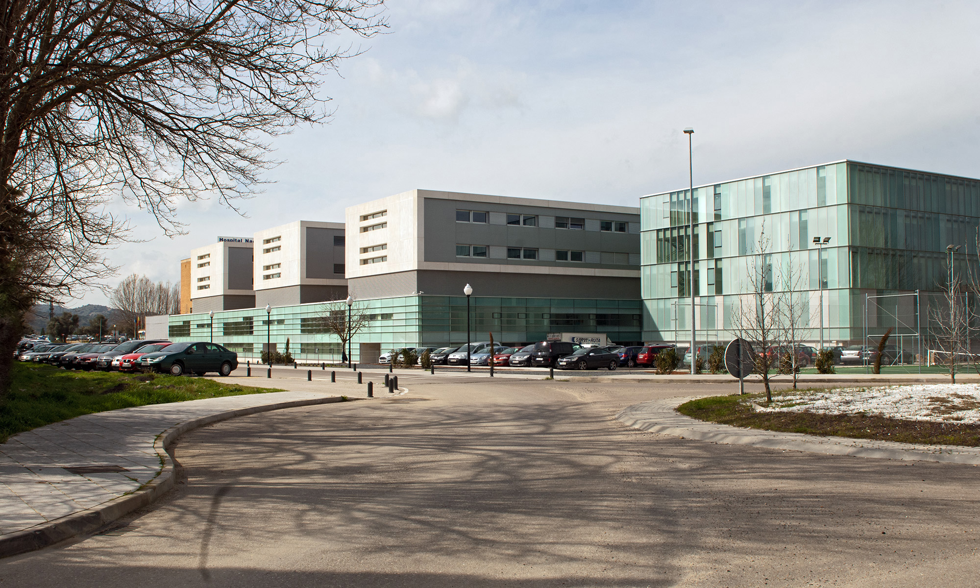 Hospital Nacional de Parapléjicos. Toledo. España